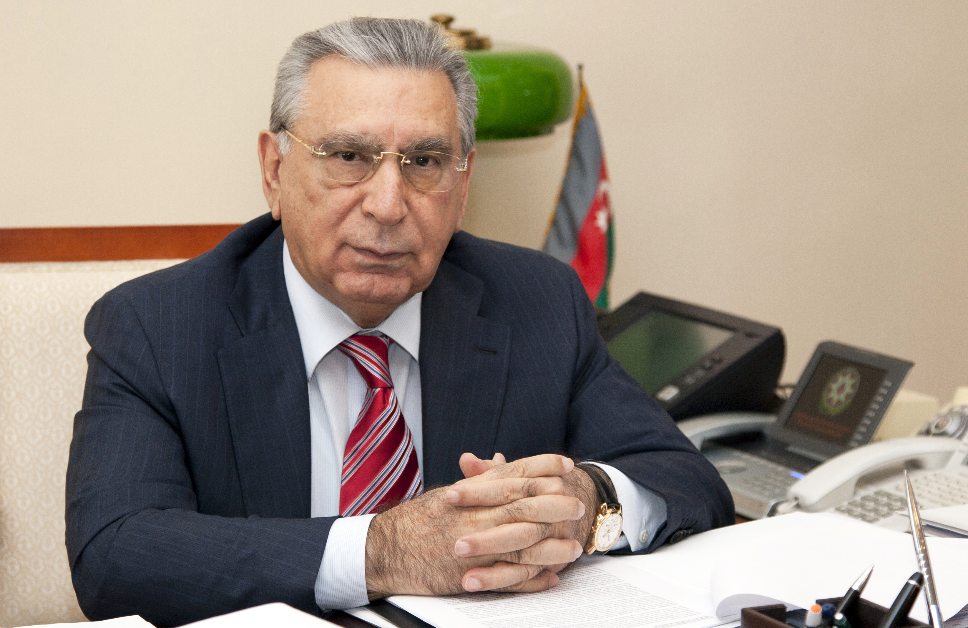 Руководитель Администрации Президента Азербайджанской Республики, академик Рамиз Мехтиев